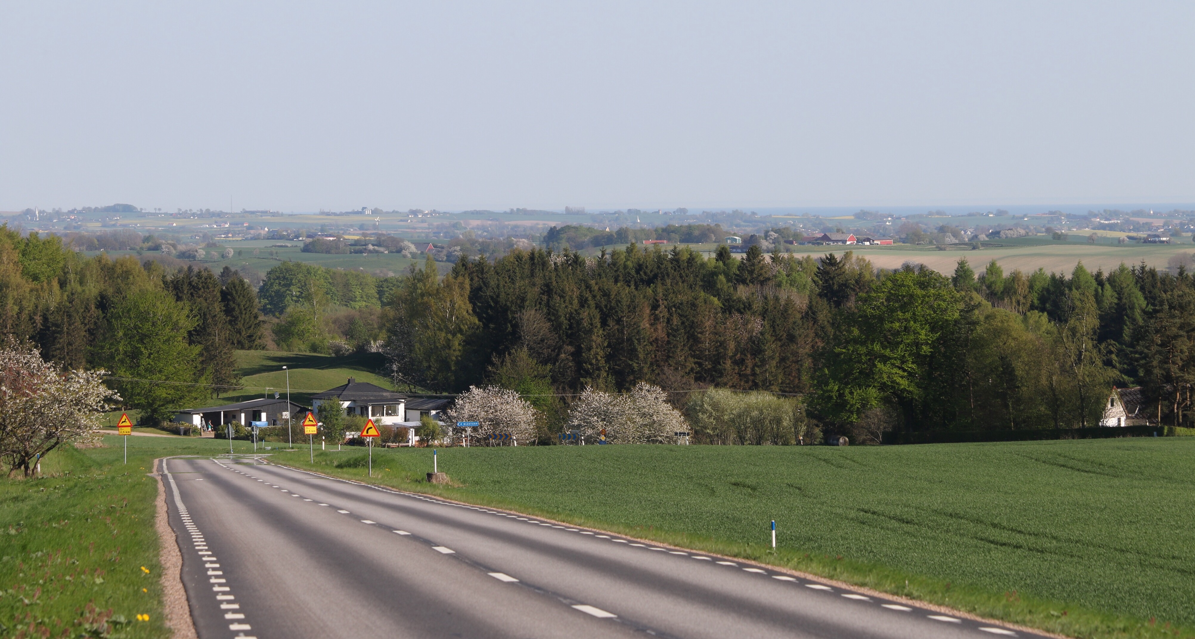 Länsväg 102 maj 2016